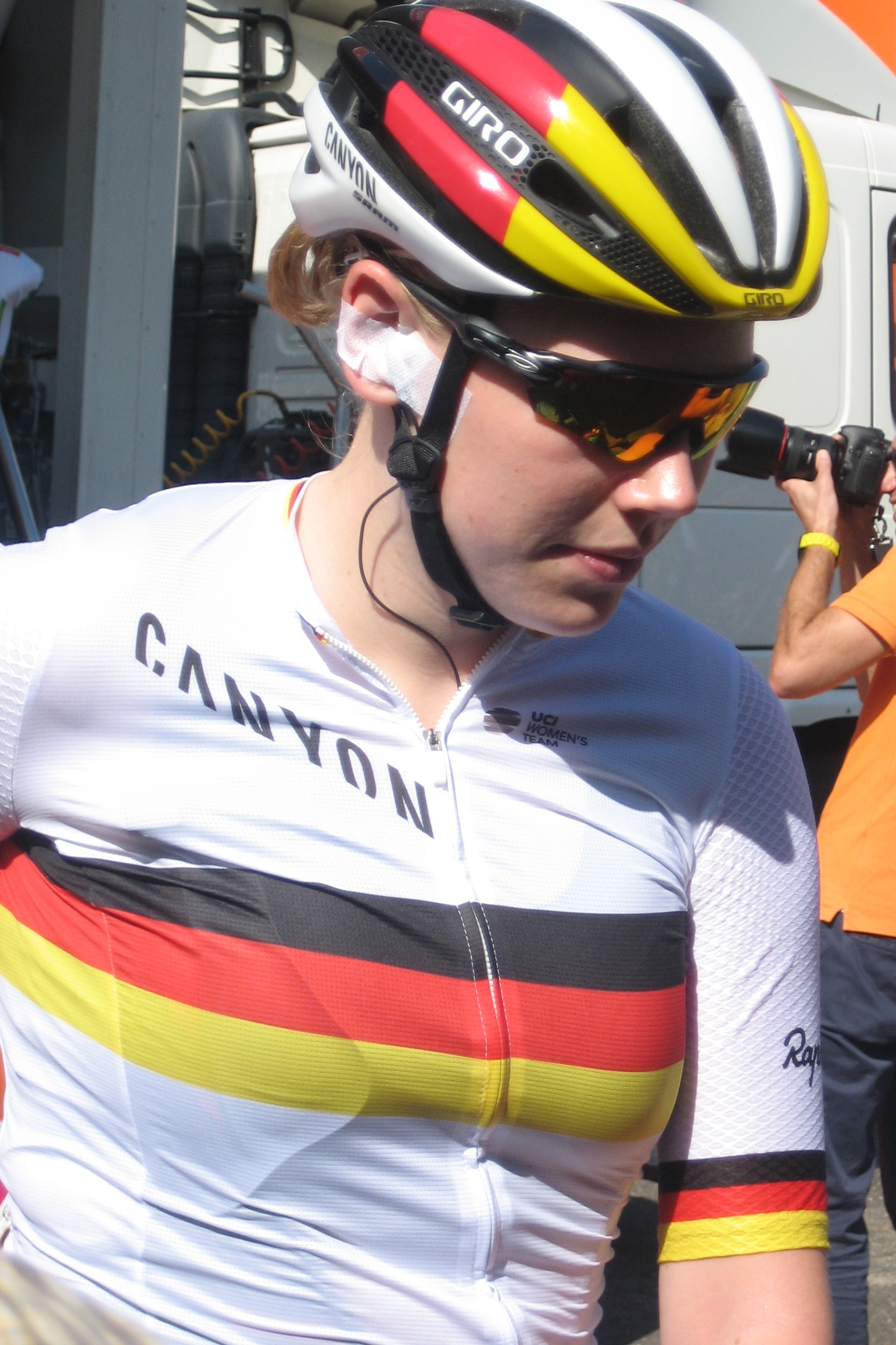 Mieke Kröger (Canyon-SRAM) voor start 3e etappe Holland Ladies Tour 2016